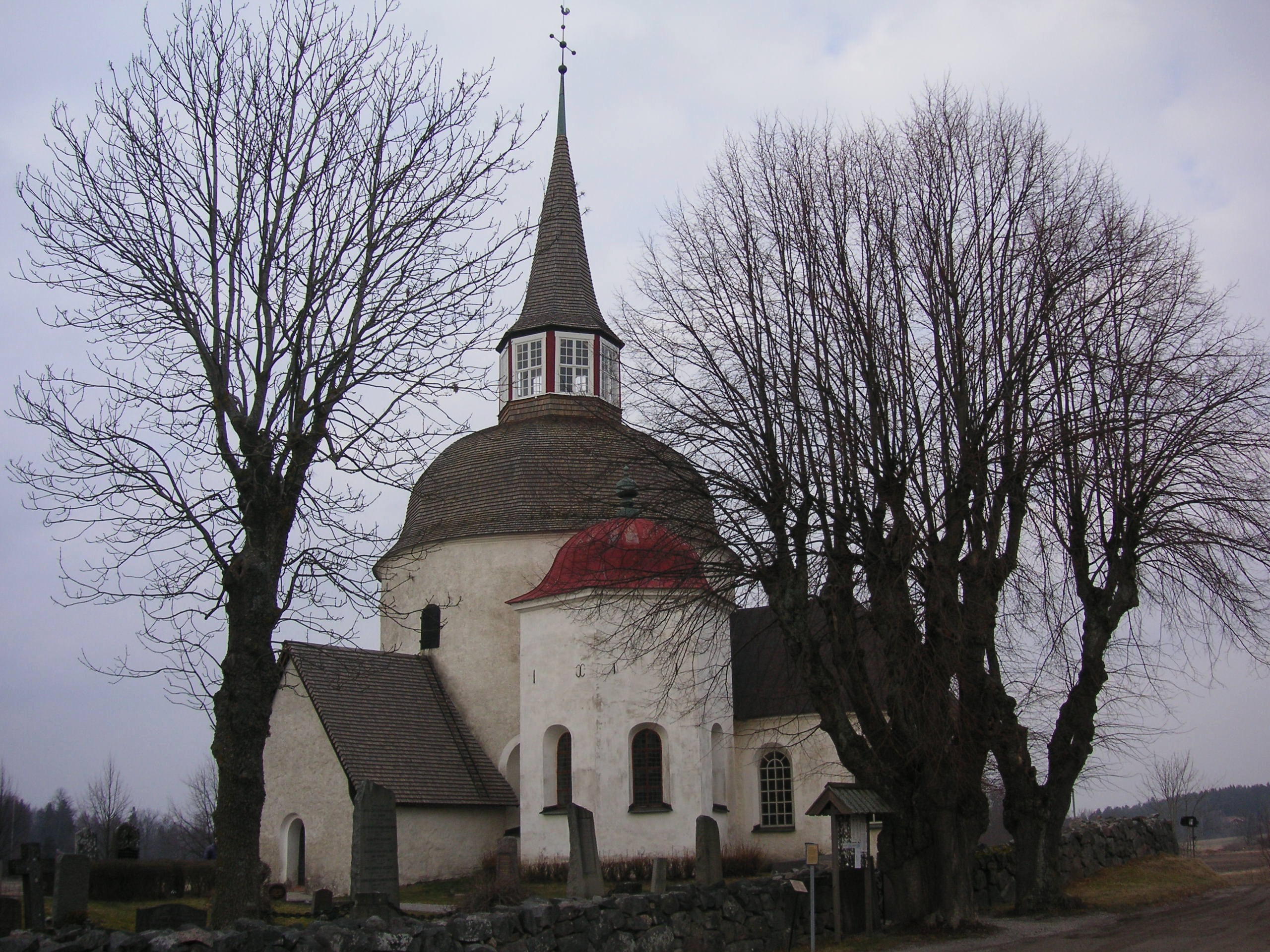 Munsö kyrka på Munsön, Ekerö kommun